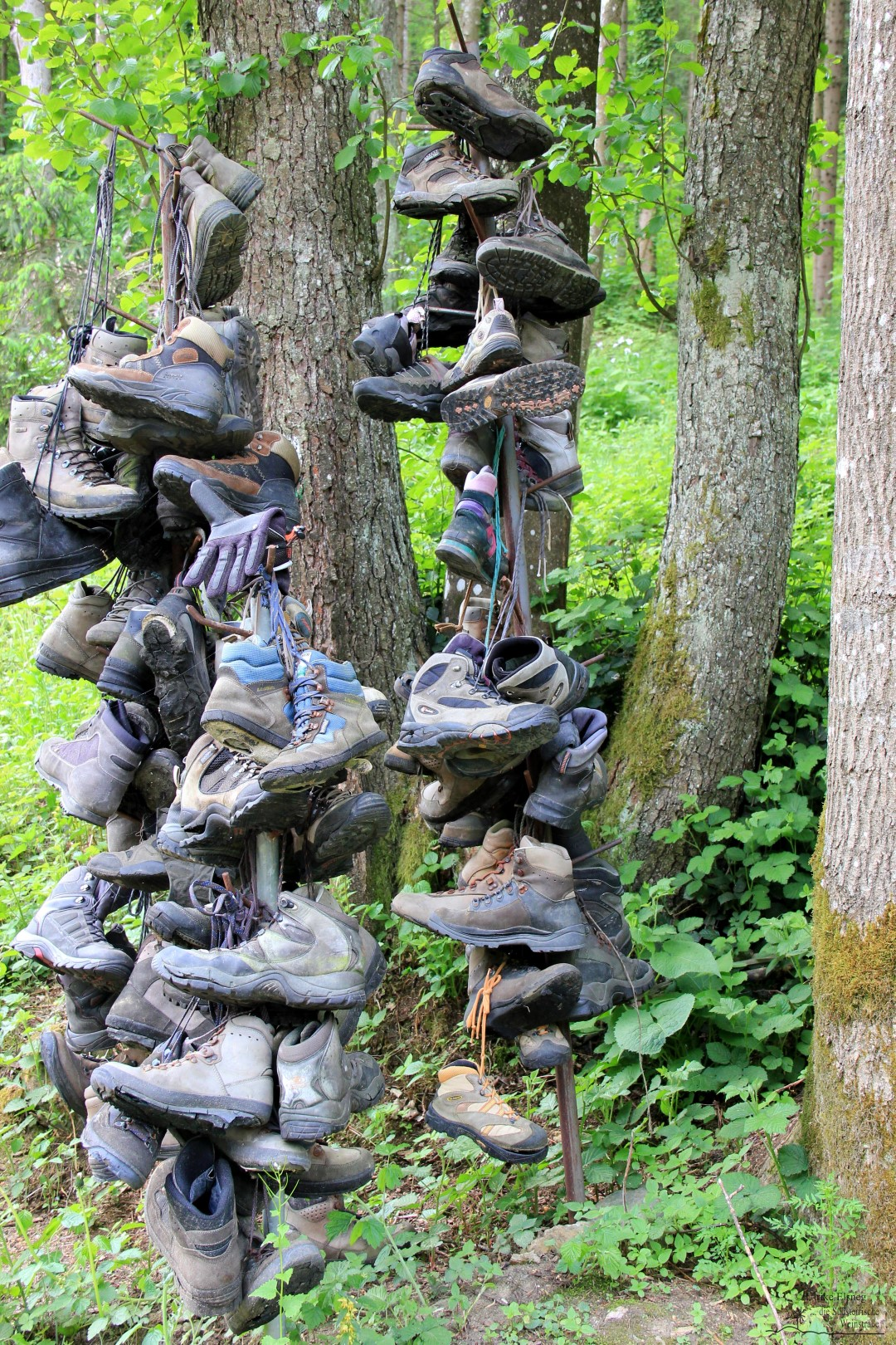 Wanderschuhe am Klammausgang - jene, die die Klammwanderung nicht überstanden haben, werden gleich zur Erinnerung dagelassen